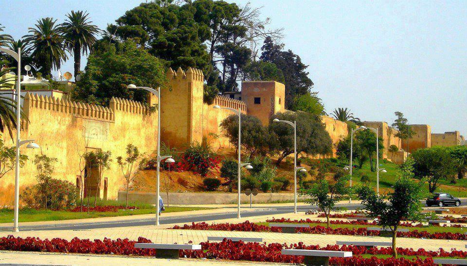 Remparts de Salé, photo, 2012